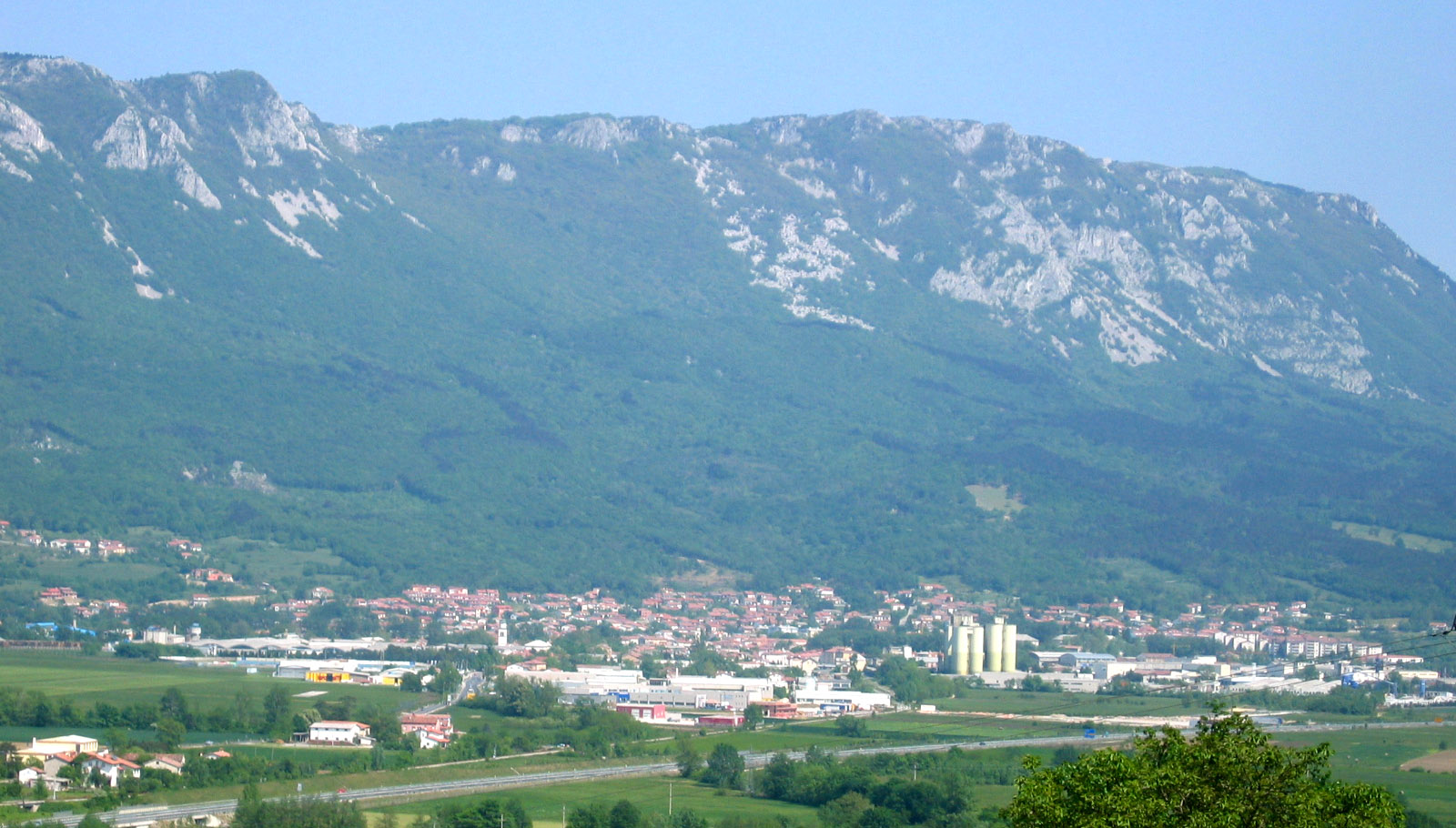 Ajdovščina, town in Slovenia